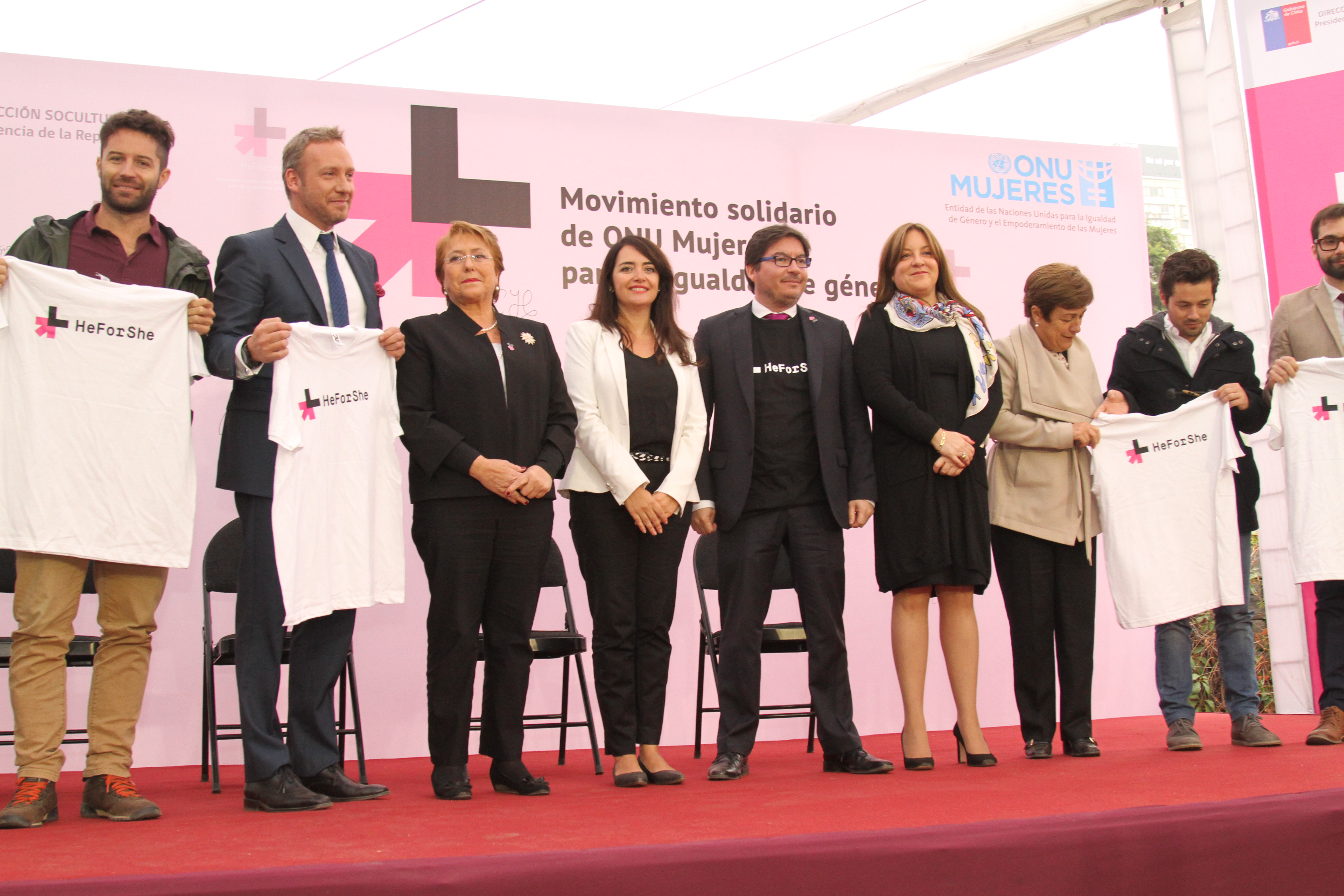 Ministro, Víctor Osorio, y Subsecretario, Jorge Maldonado, asisten a lanzamiento Campaña #HeForShe